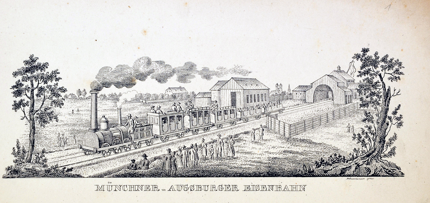 München-Augsburger Eisenbahn, aus: Erinnerungen an München. München, Hochwind, o. J. [ca. 1840]). Steingravüre.